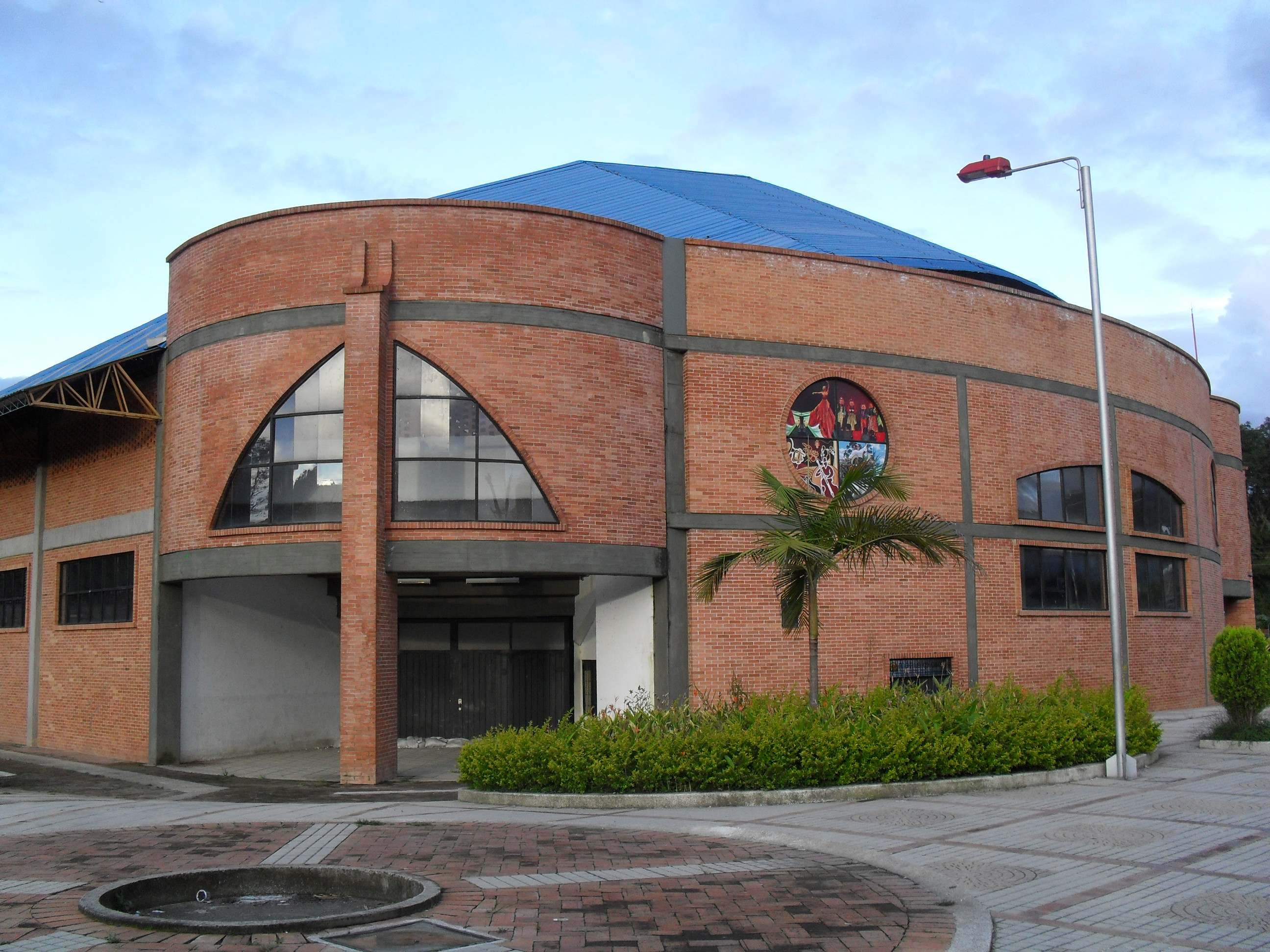 Coliseo cubierto de deortes en Miniquirá, Boyacá, Colombia